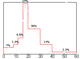 Exemple d'histogramme avec lissage. Image personnelle créée avec gnuplot et gimp.